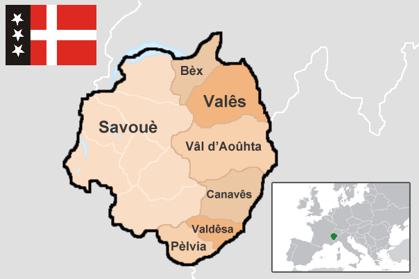 Arpetan: La Fèdèracion Harpeitanya, un payis fèdèrâl dus Arpes, avouéc coment ètats: la Savouè, lo Valês et la Val d'Aouhta. L'est proposâ d'ense per lo mouvament Harpeitanya Etnocrateka Libra (HEL) en 1972.